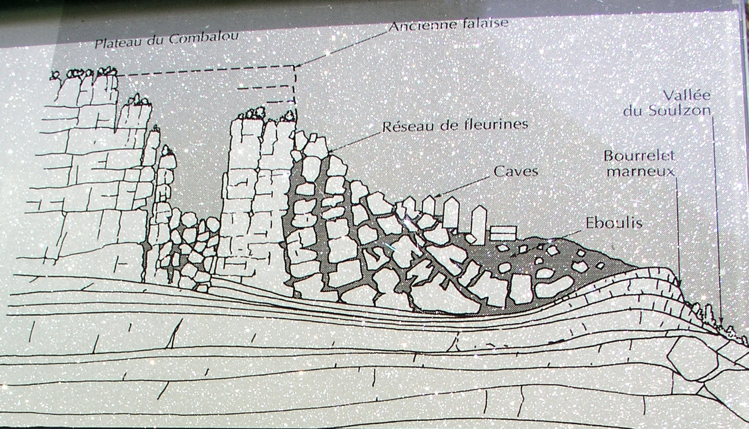 Panneau explicatif sur le sentier des Echelles qui monte au Combalou, Roquefort-sur-Soulzon, Aveyron, France.